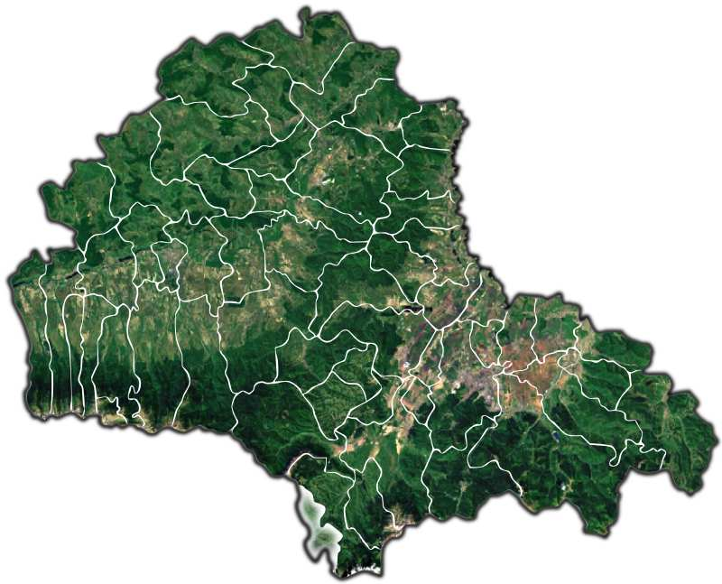 Fundata jud Brasov